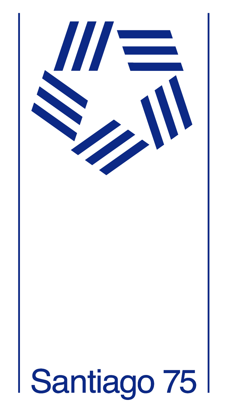 Símbolo de los Juegos Panamericanos de 1975 cuando Santiago era inicialmente la ciudad sede (posteriormente descartada).